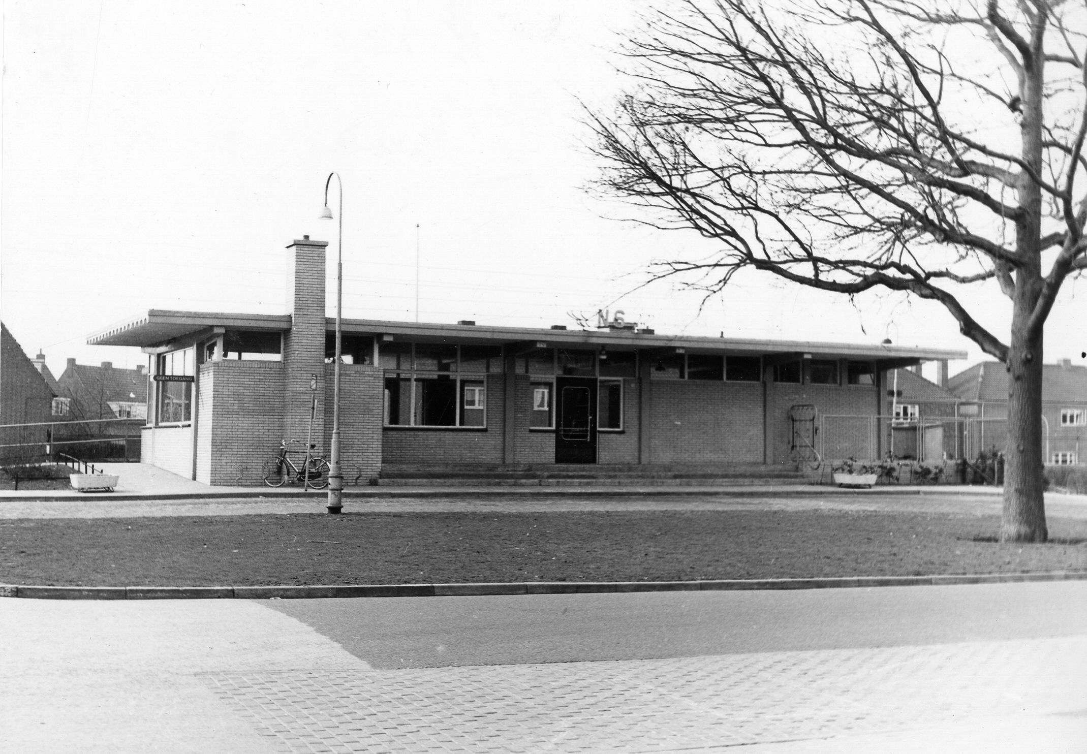 Gezicht op de perronzijde van het N.S.-station De Riet te Almelo. N.B. De naam De Riet is later gewijzigd in Almelo de Riet. Het Utrechts Archief - Catalogusnummer 150036